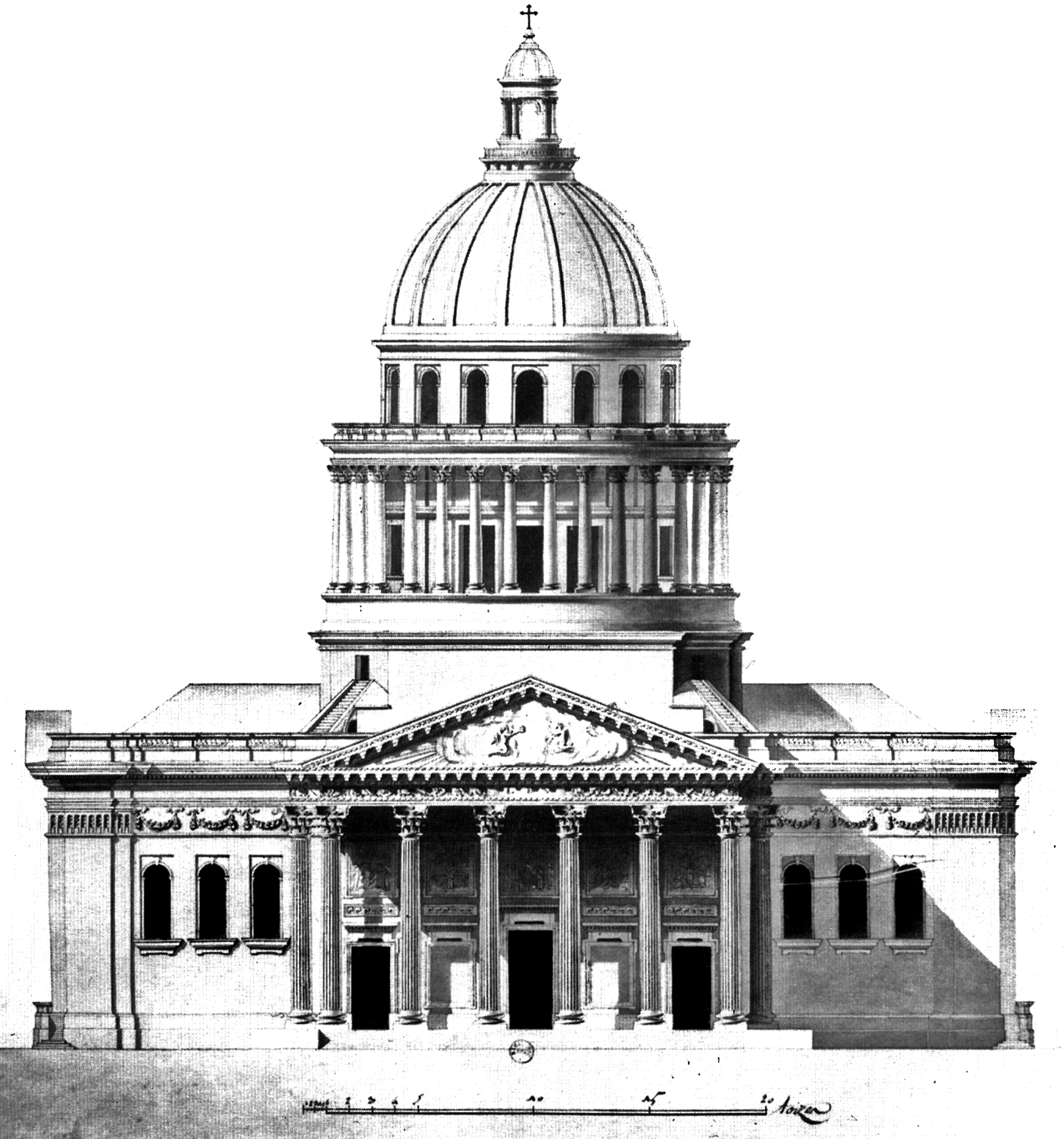 Façade principale du Panthéon de Paris, projet (réalisé) de Jacques-Germain Soufflot